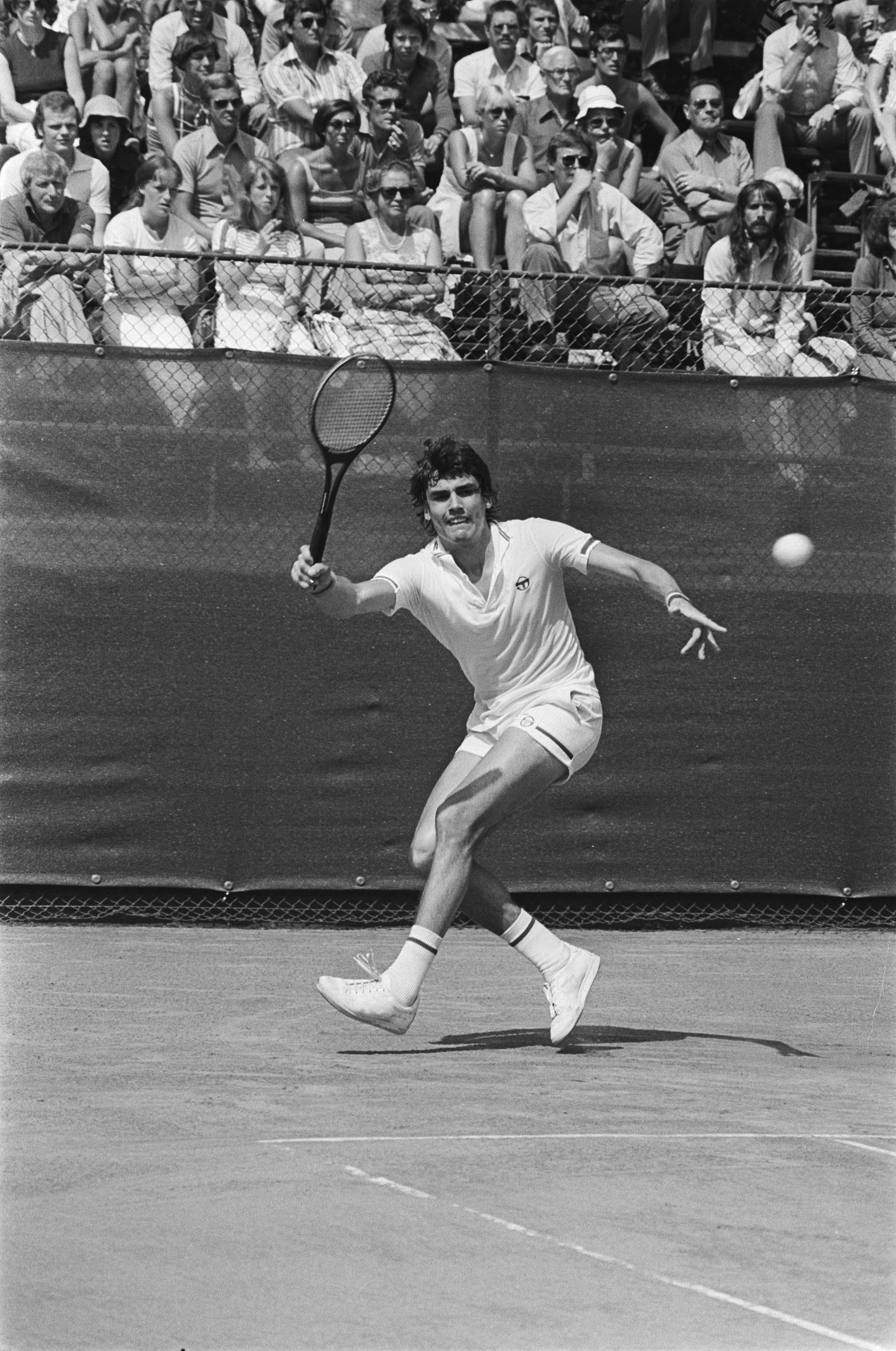 Collectie / Archief : Fotocollectie Anefo Reportage / Serie : [ onbekend ] Beschrijving : Internationale tennistoernooi Melkhuisje in Hilversum; Pecei in actie (tegen Sanders) Datum : 12 juli 1977 Locatie : Hilversum Trefwoorden : tennis Persoonsnaam : Sanders Instellingsnaam : Melkhuisje, 't Fotograaf : Verhoeff, Bert / Anefo Auteursrechthebbende : Nationaal Archief Materiaalsoort : Negatief (zwart/wit) Nummer archiefinventaris : bekijk toegang 2.24.01.05 Bestanddeelnummer : 929-2645